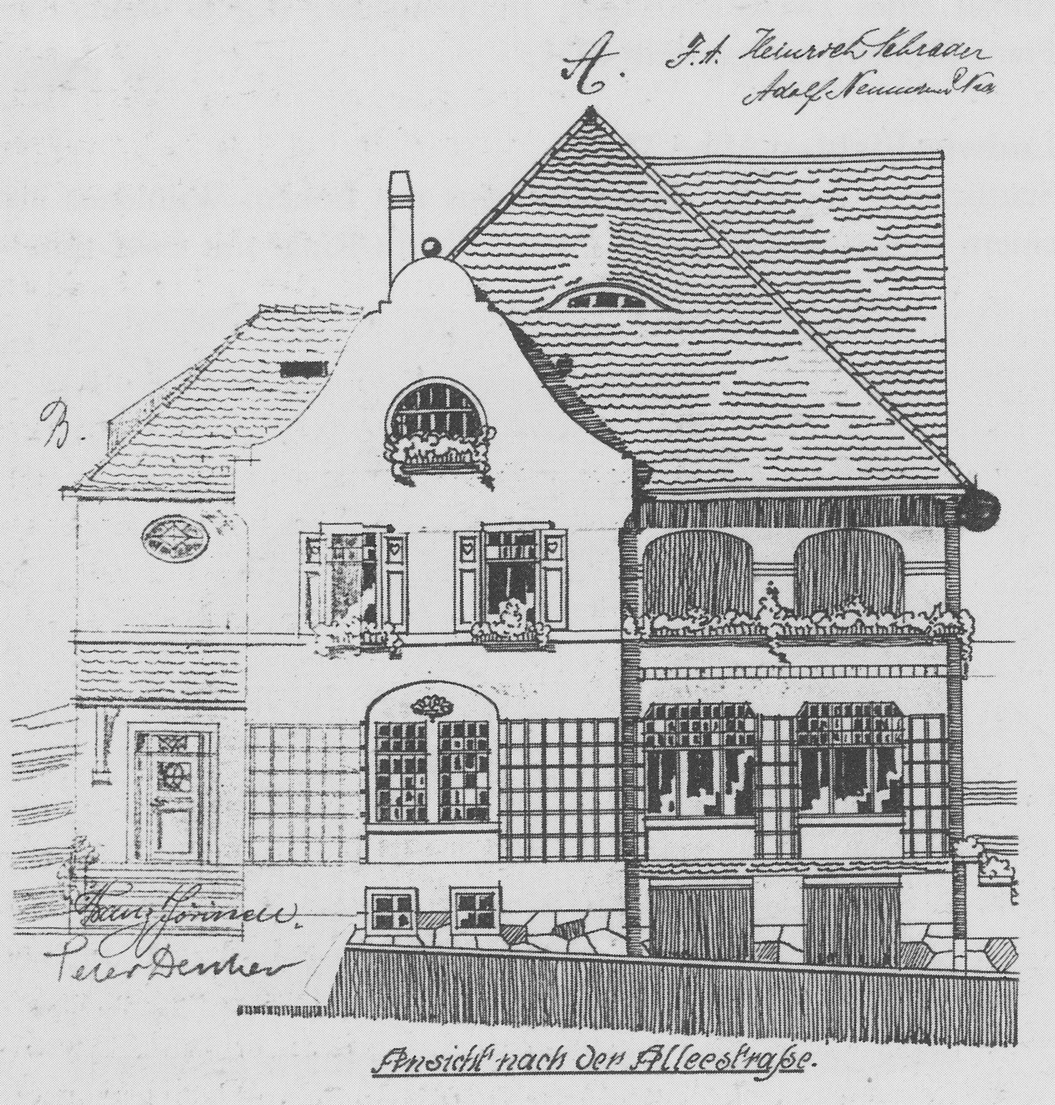 Radebeul Mietvilla Heinrich Schrader Bauzeichnung 1909